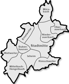 Districts of German town Zweibrücken